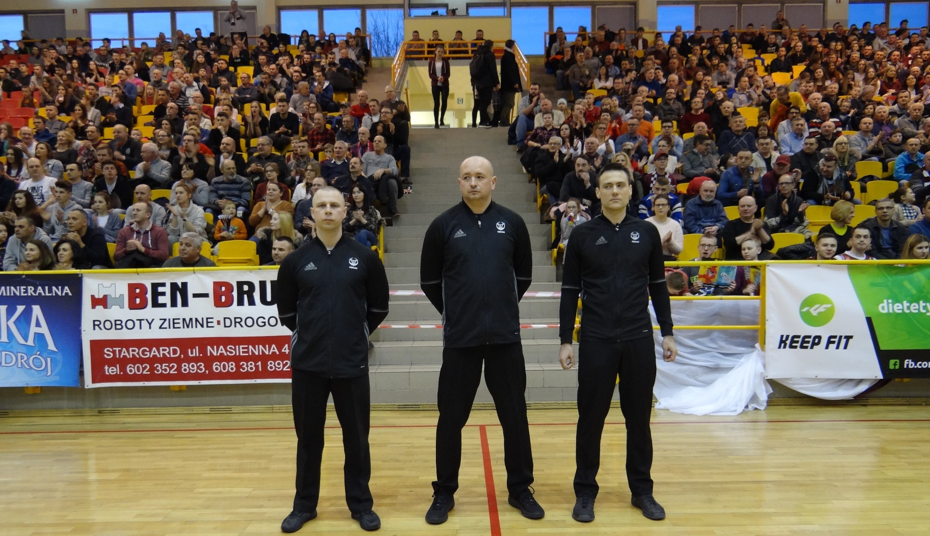 Sędziowie meczu Spójnia Kotwica, 17.01.2018